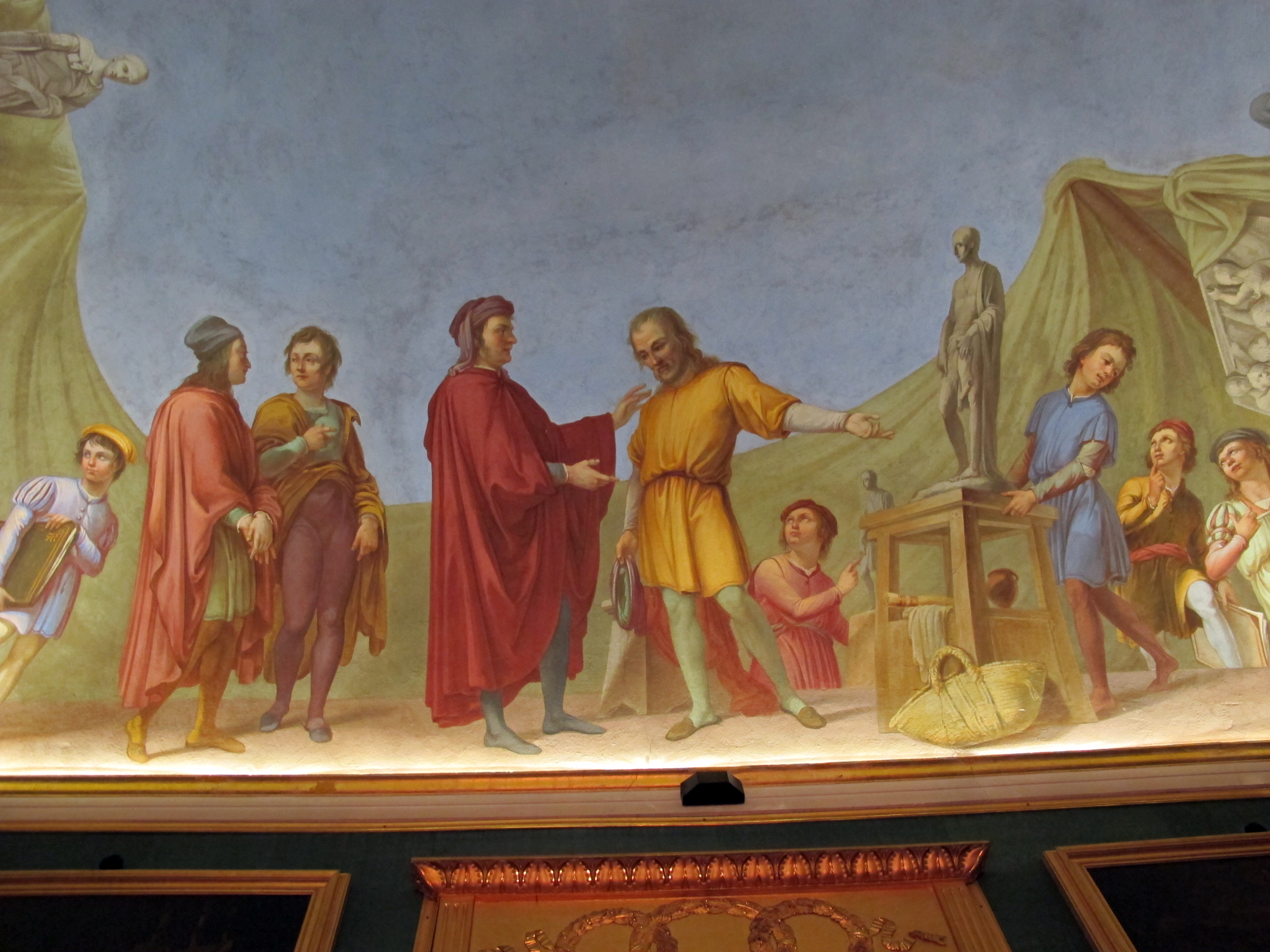 Museo di Casa Martelli - MIBAC This is a photo of a monument which is part of cultural heritage of Italy.